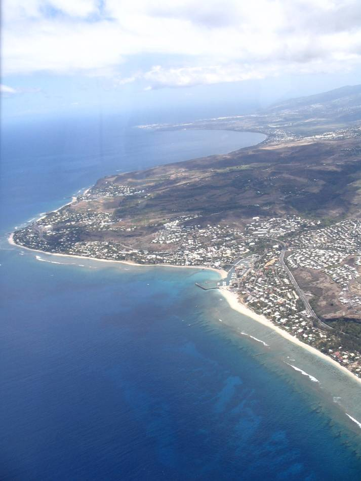 Photo prise par Nerijp le 23 novembre 2004. Elle est libre de droit d'après cette page.